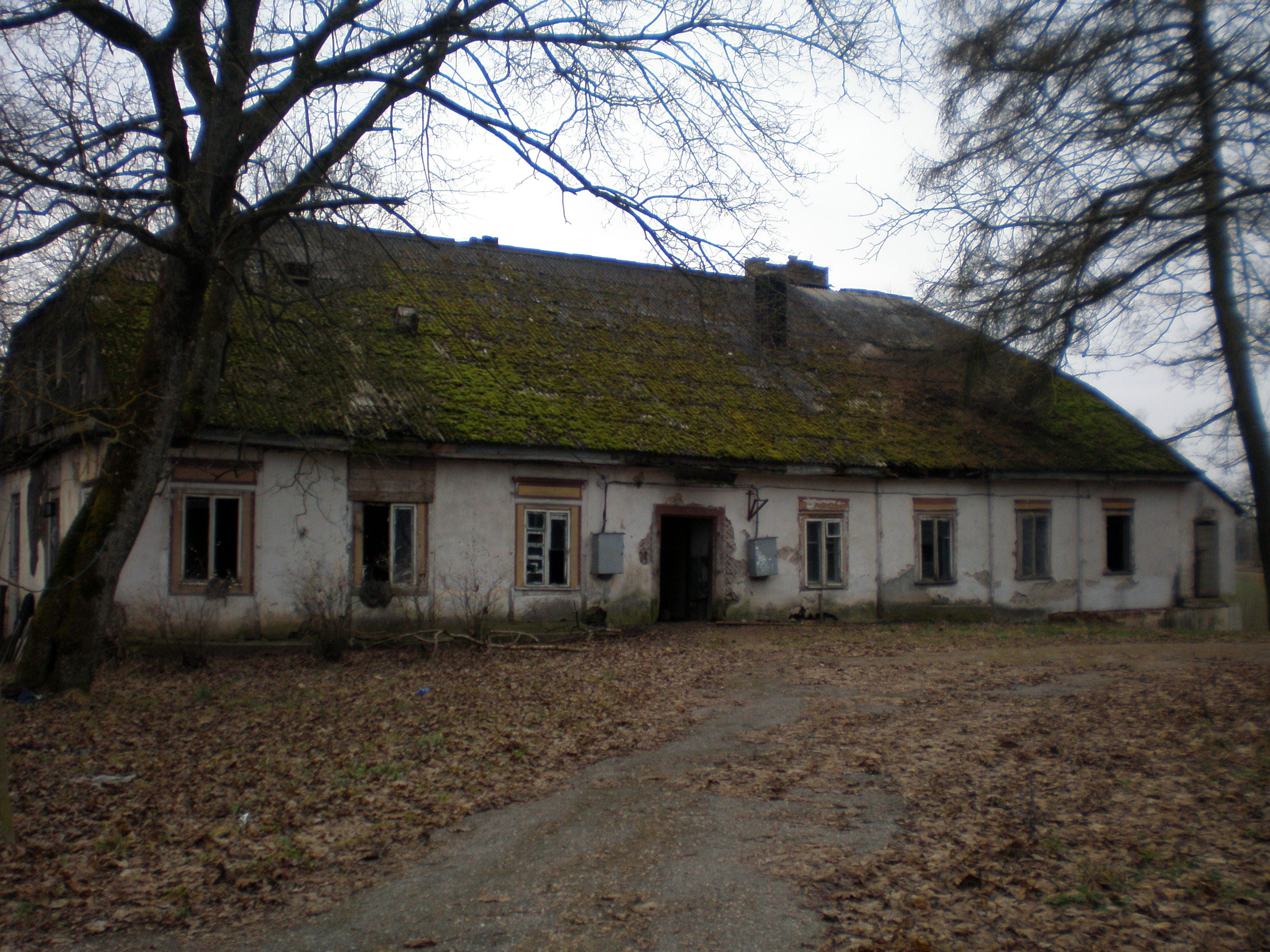 Sližių dvaras